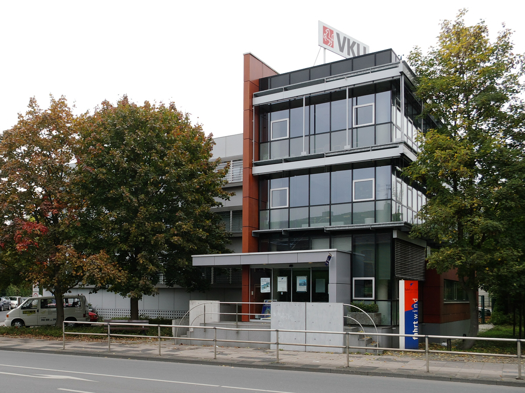 Betriebsleitung der Verkehrsgesellschaft für den Kreis Unna (VKU) in Kamen